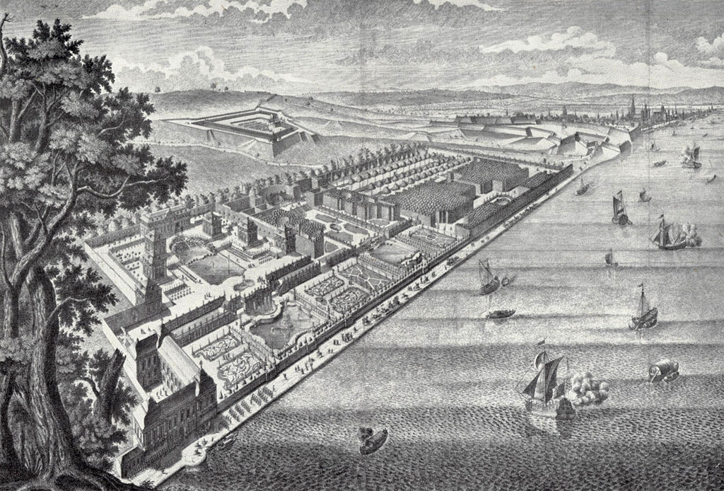 „Perspectivischer Auffzug der Churfürstl. Mayntz. Favoriten, samt denen Lusthäusern, Fontainen und Cascaden, wie solche disseits deß Rheins lieget“ - Gesamtansicht des Lustschlosses Favorite Mainz in einem Stich von Salomon Kleiner, 1726